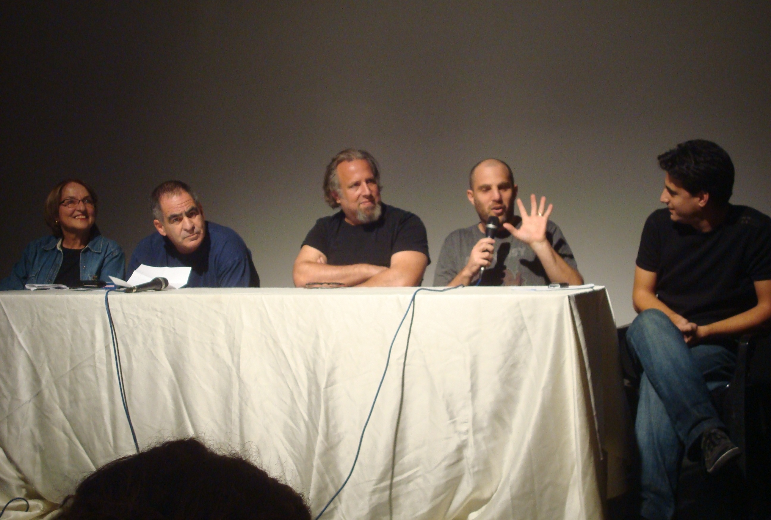 יום עיון לכבוד צאת ספרו של פבלו אוטין קרחונים בארץ חמסין